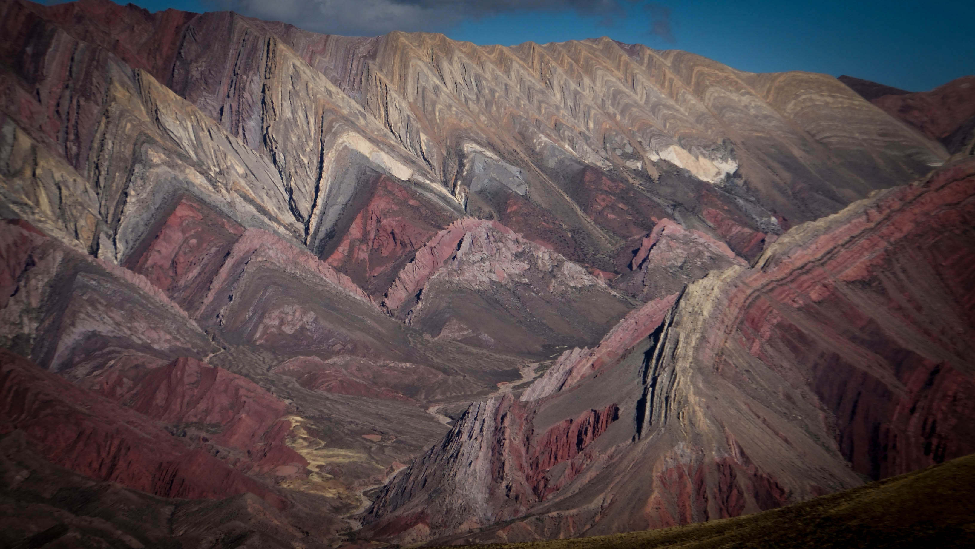 Cerro Hornocal - Humuhuaca - Jujuy